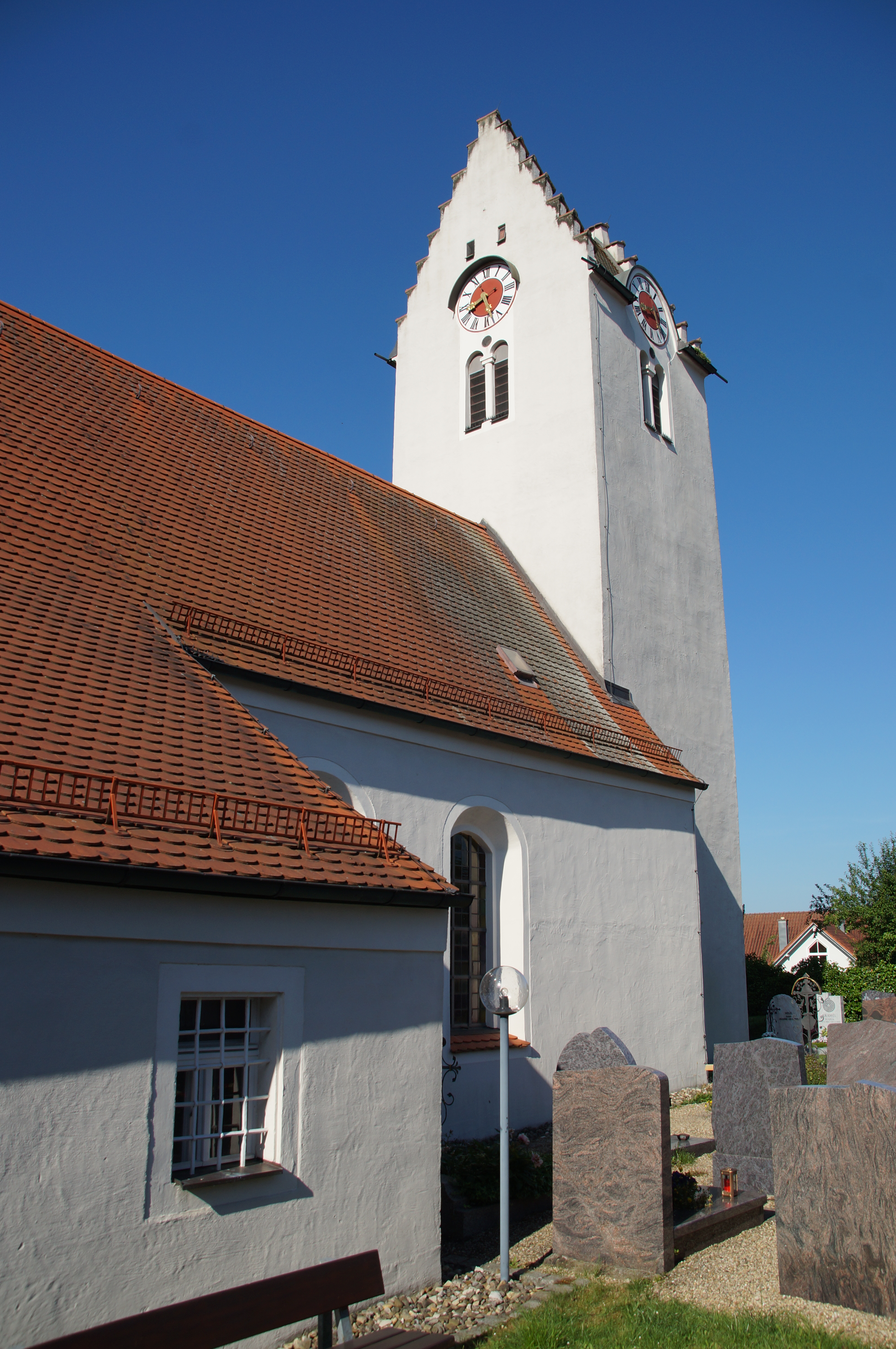 Katholische Filialkirche St. Martin, Saalbau mit abgewalmtem Satteldach und Fassadenturm mit Treppengiebeln, spätromanisch, 13. Jahrhundert, Chor Ende 14. Jahrhundert, Langhaus ab 1727 umgebaut; mit Ausstattung; Friedhofsmauer mit übergiebeltem Tor, barock